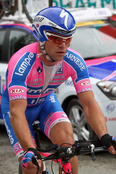 Prologue du Critérium du Dauphiné 2011, Saint Jean de Maurienne